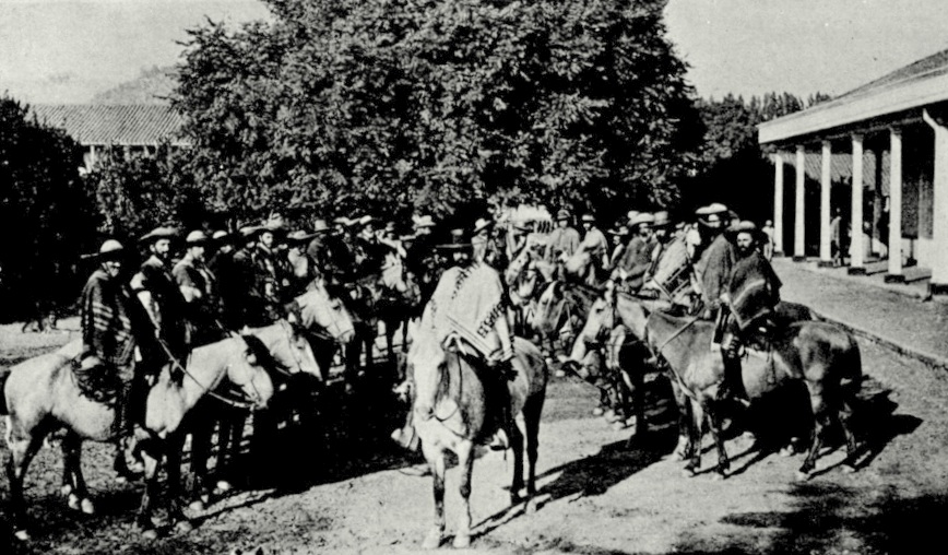 Imagen en Chile descripción física, política, social industrial y comercial de la República de Chile, por Carlos Tornero.1903